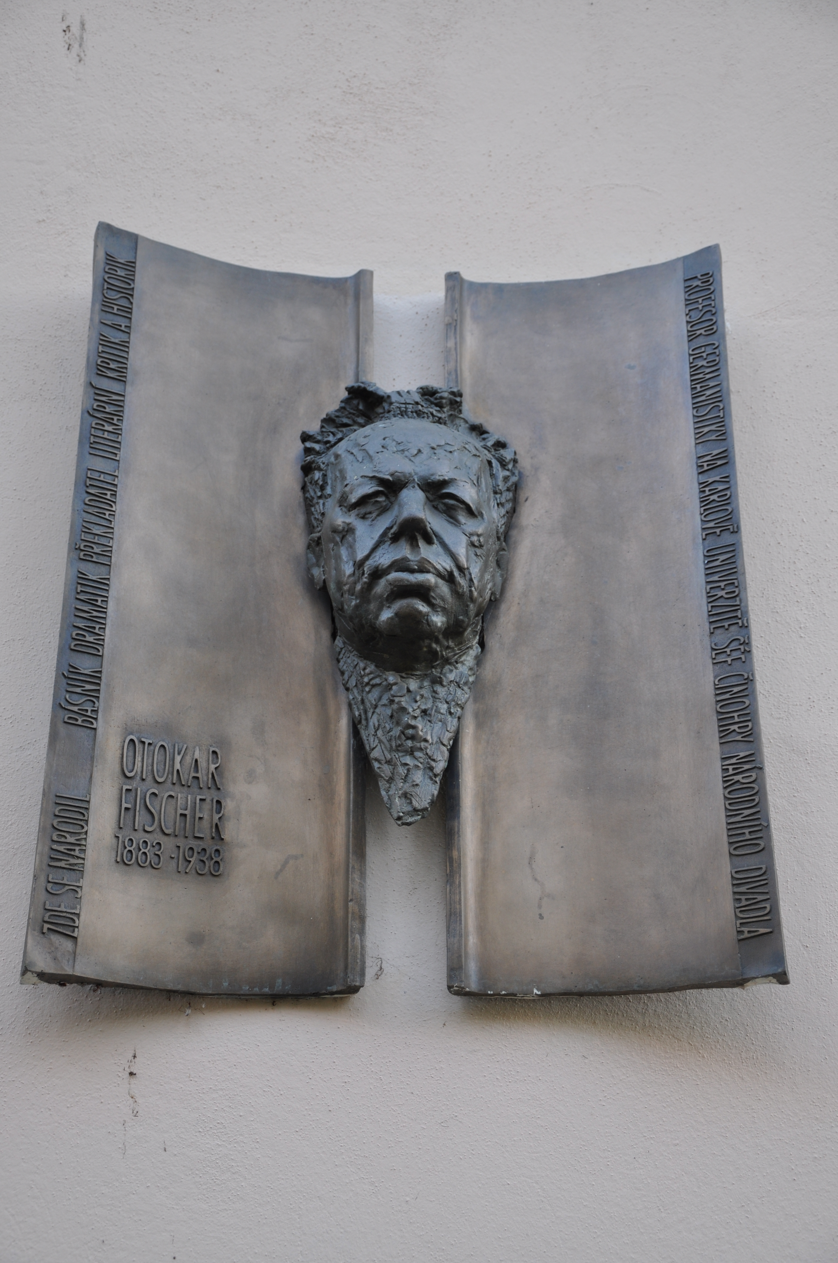 Otokar Fischer (1883-1938) was a Czech translator, playwright, poet and critic. Pamětní deska v Kolíně.